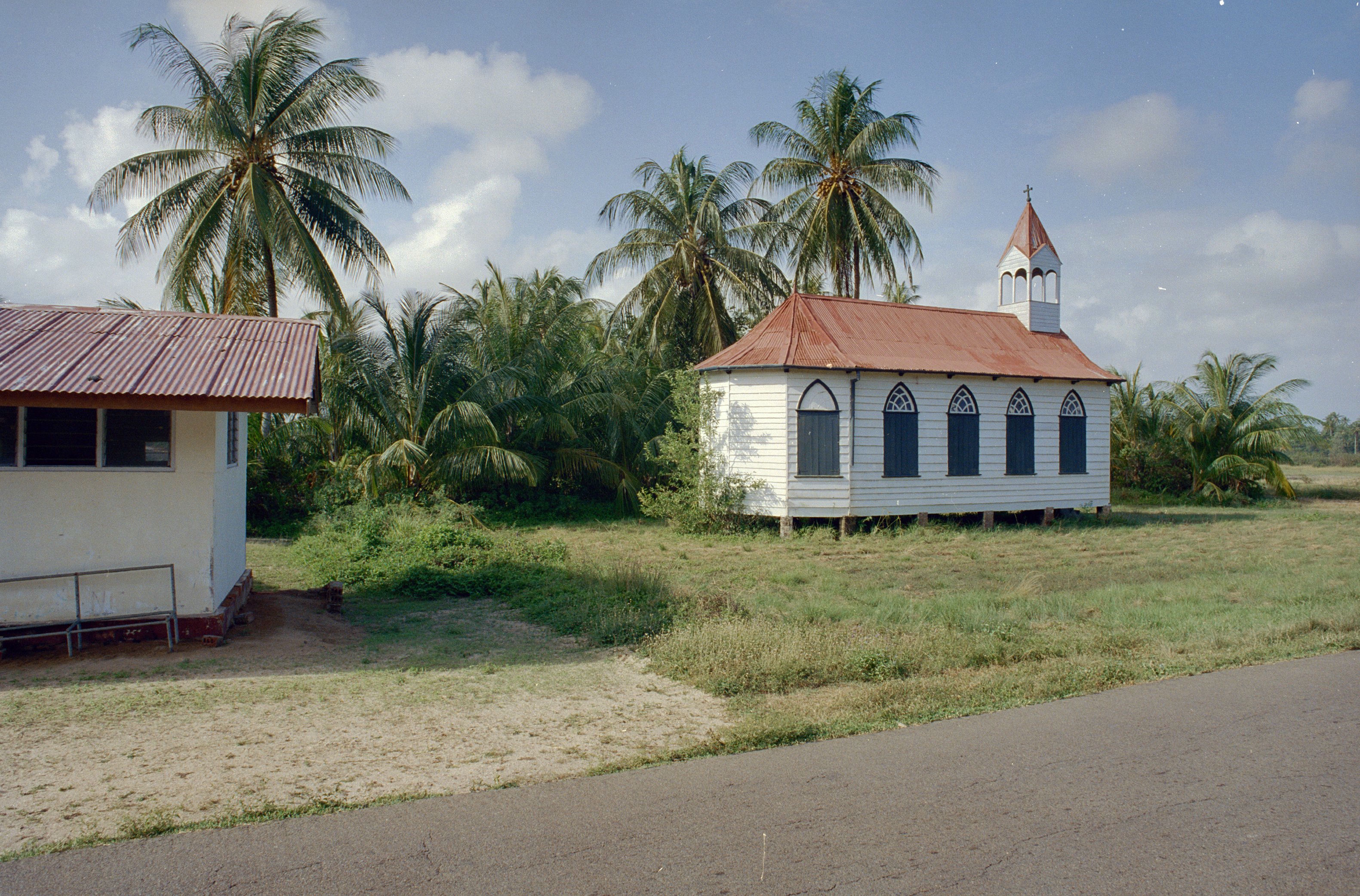 Koloniale geschiedenis/ Kerken: Zicht op kerk (opmerking: Suriname Reis Loek Tangel)